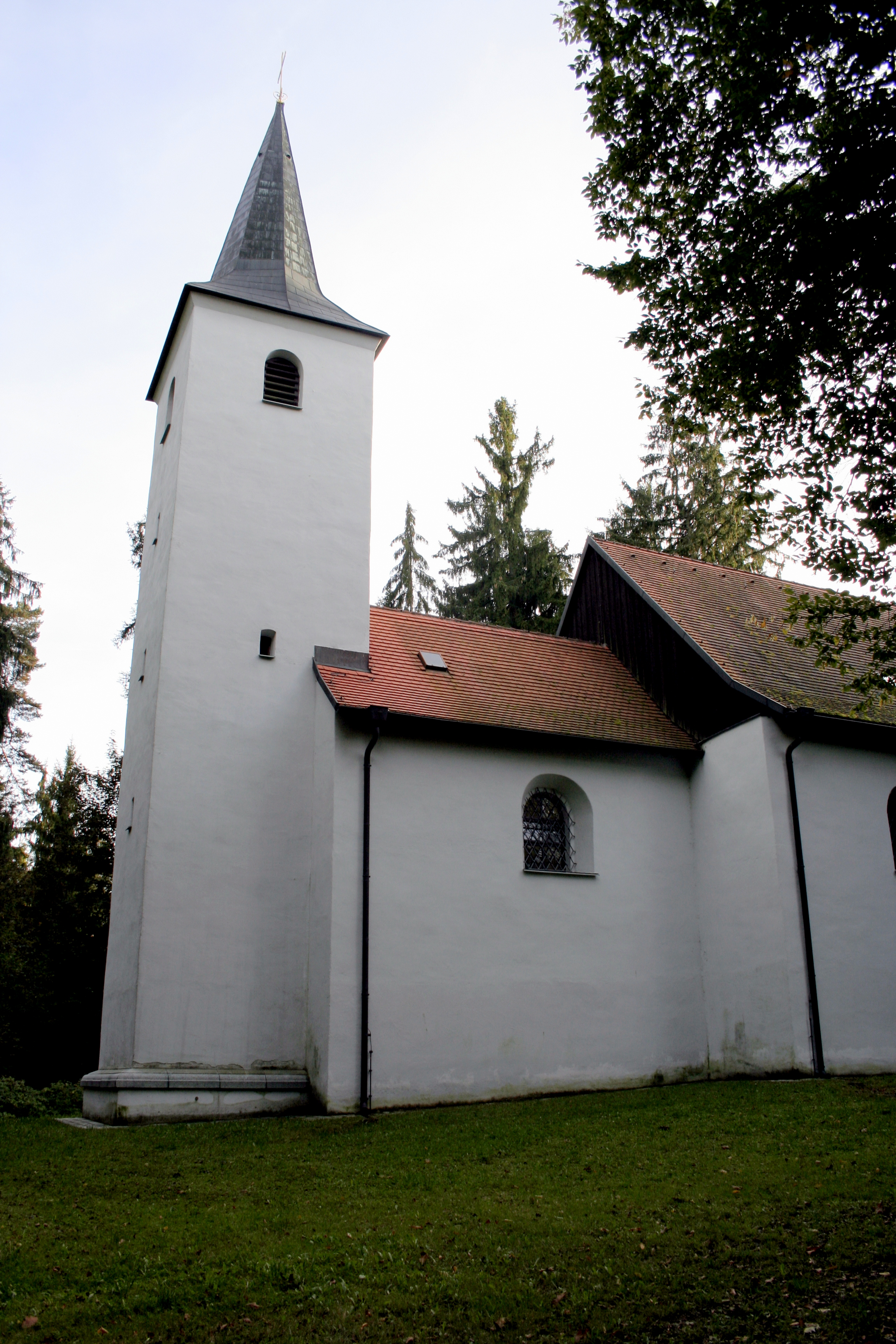 Baudenkmal Deutschland; Bayern; Oberpfalz; Neustadt a.d.Waldnaab; Pleystein; Burkhardsrieth: katholische Wallfahrtskirche St. Ulrich bez. 1689; mit Ausstattung.This is a photograph of an architectural monument.